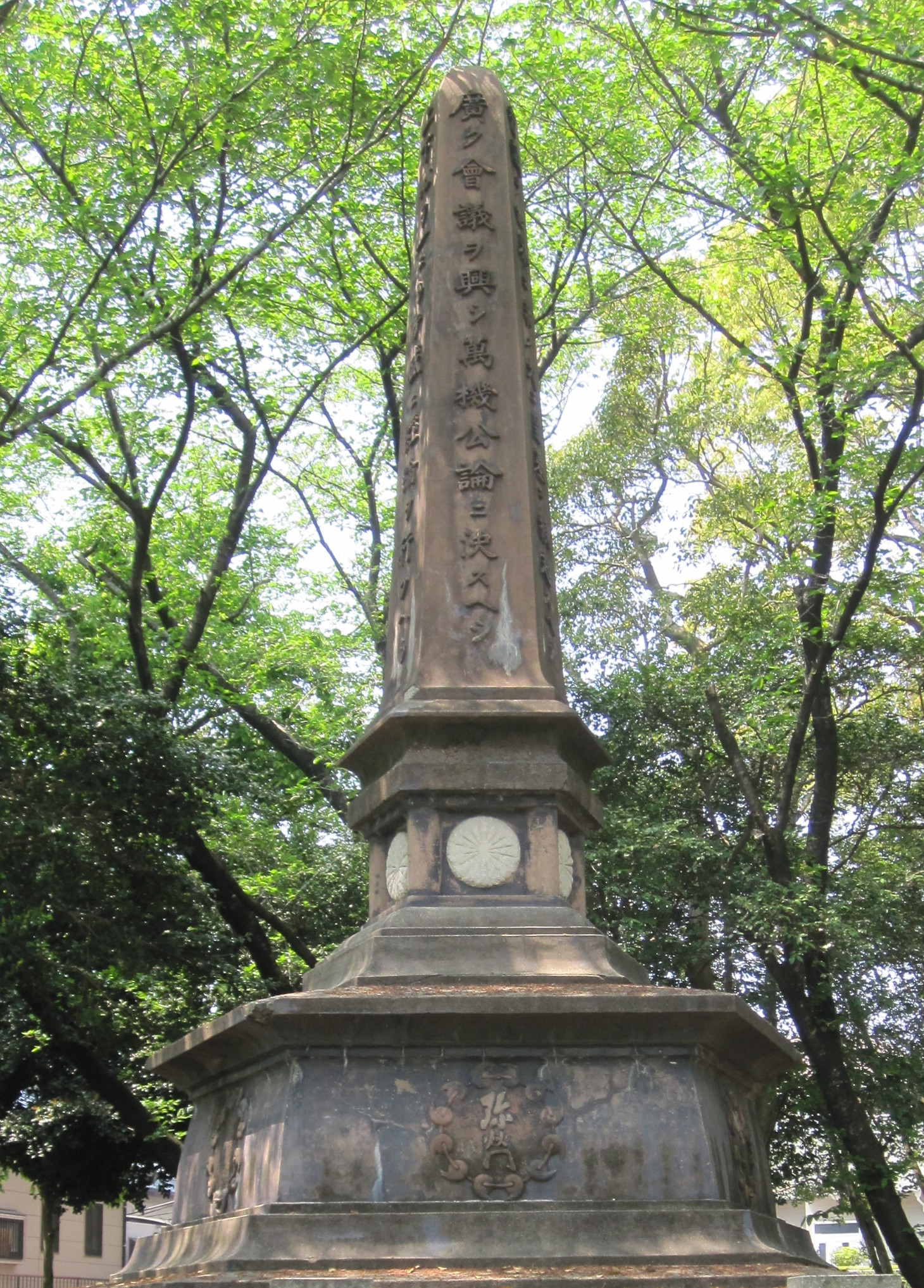 白山公園にて保存用資料として撮影